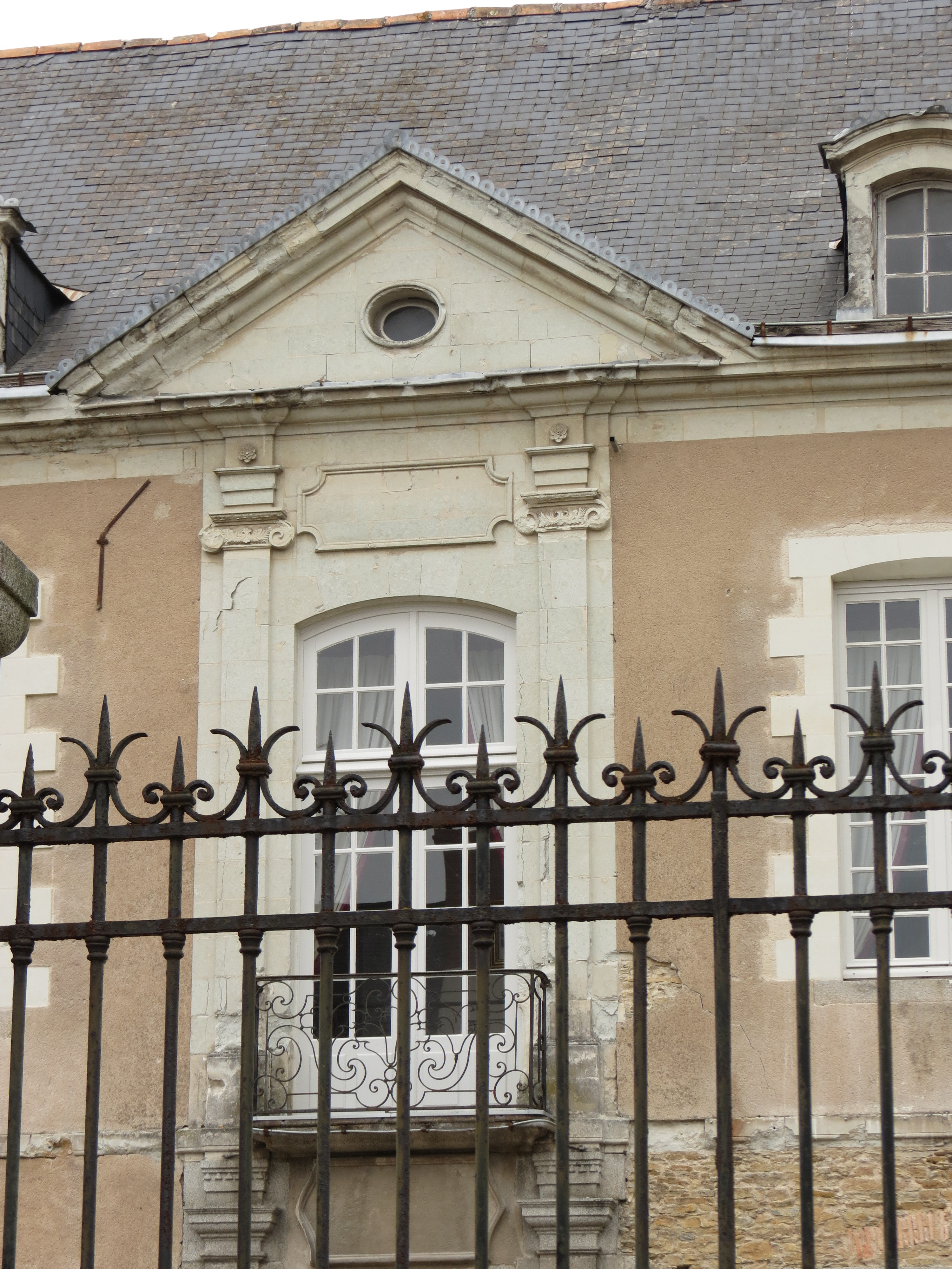 Hôtel d'Argentré, Laval, Mayenne, Pays de la Loire.